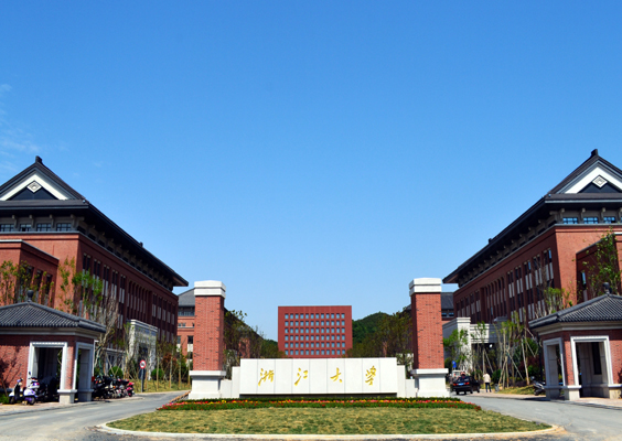 浙江大学舟山小区